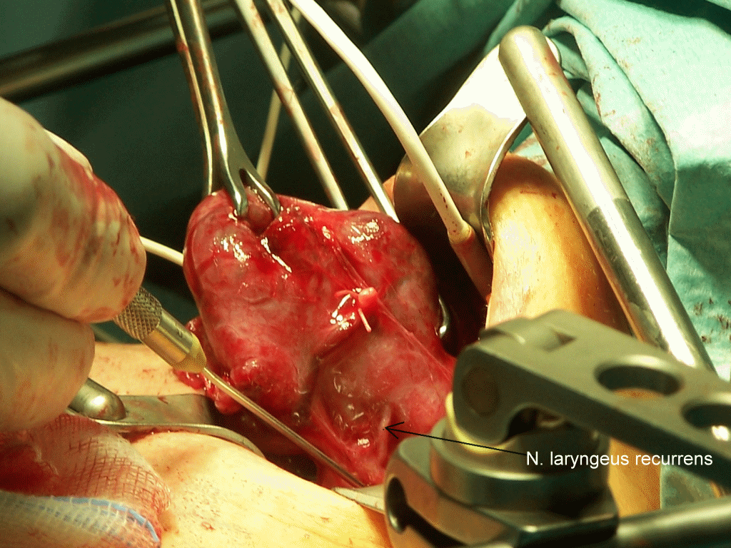 Strumaresektion; N.laryngeus recurrens komplett dargestellt